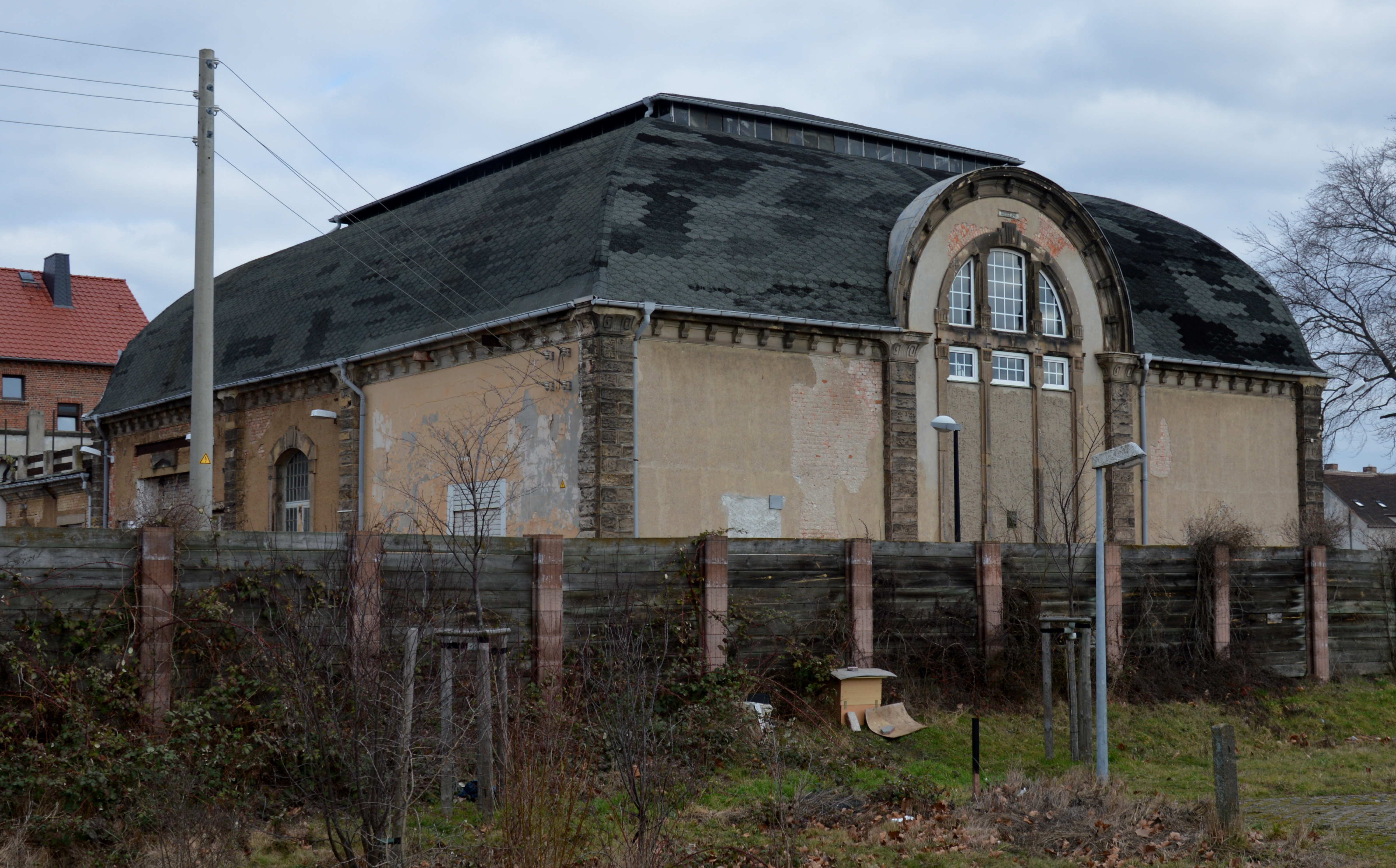 Umspannwerk Schönebeck